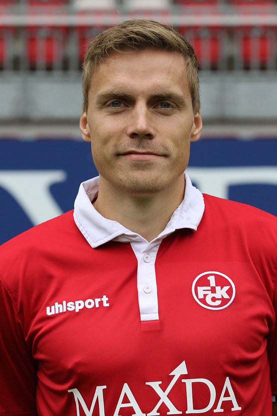 Ruben Jenssen